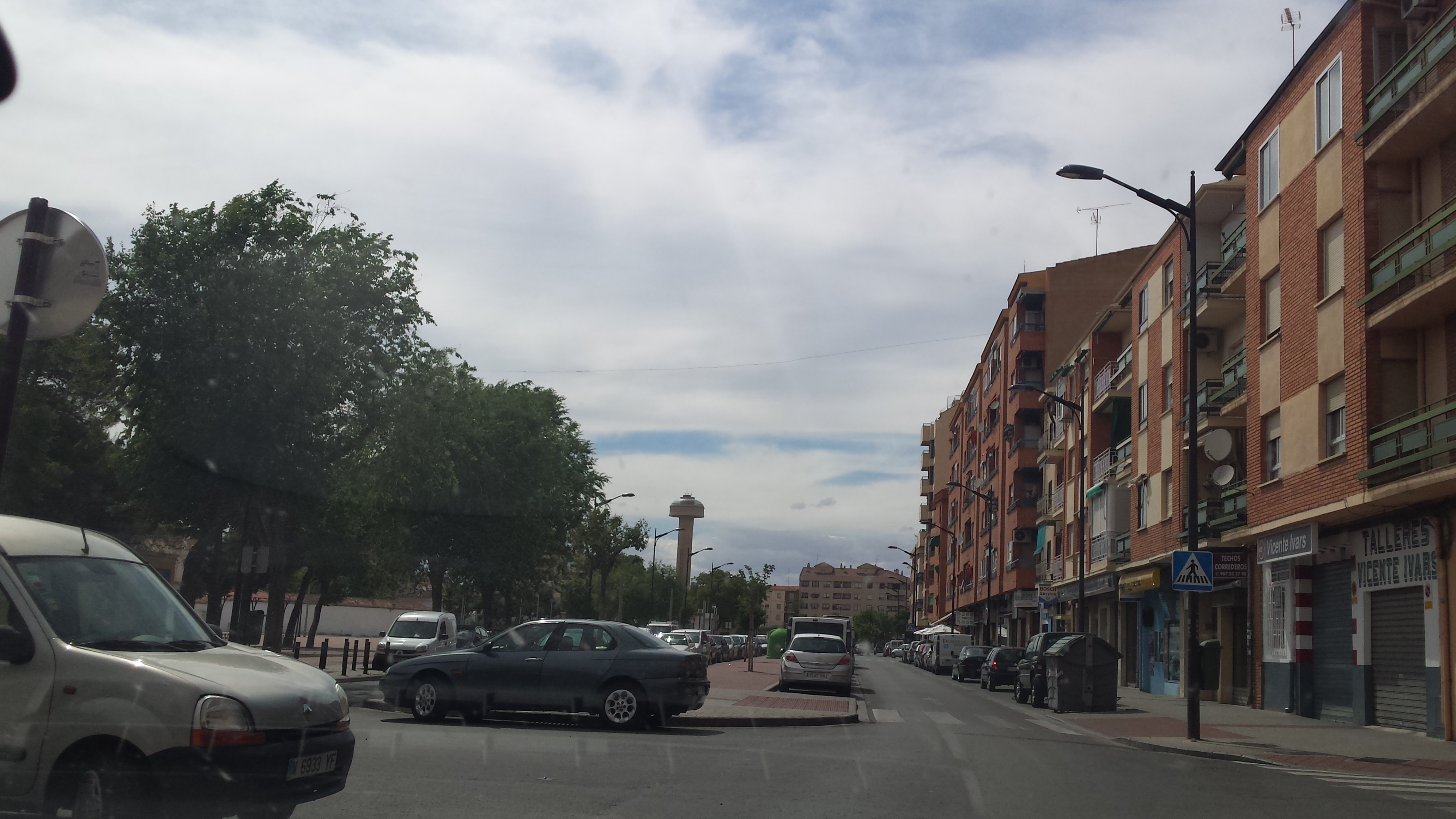 Avenida de los Toreros. Torre de los Depósitos de la Fiesta del Árbol. Albacete